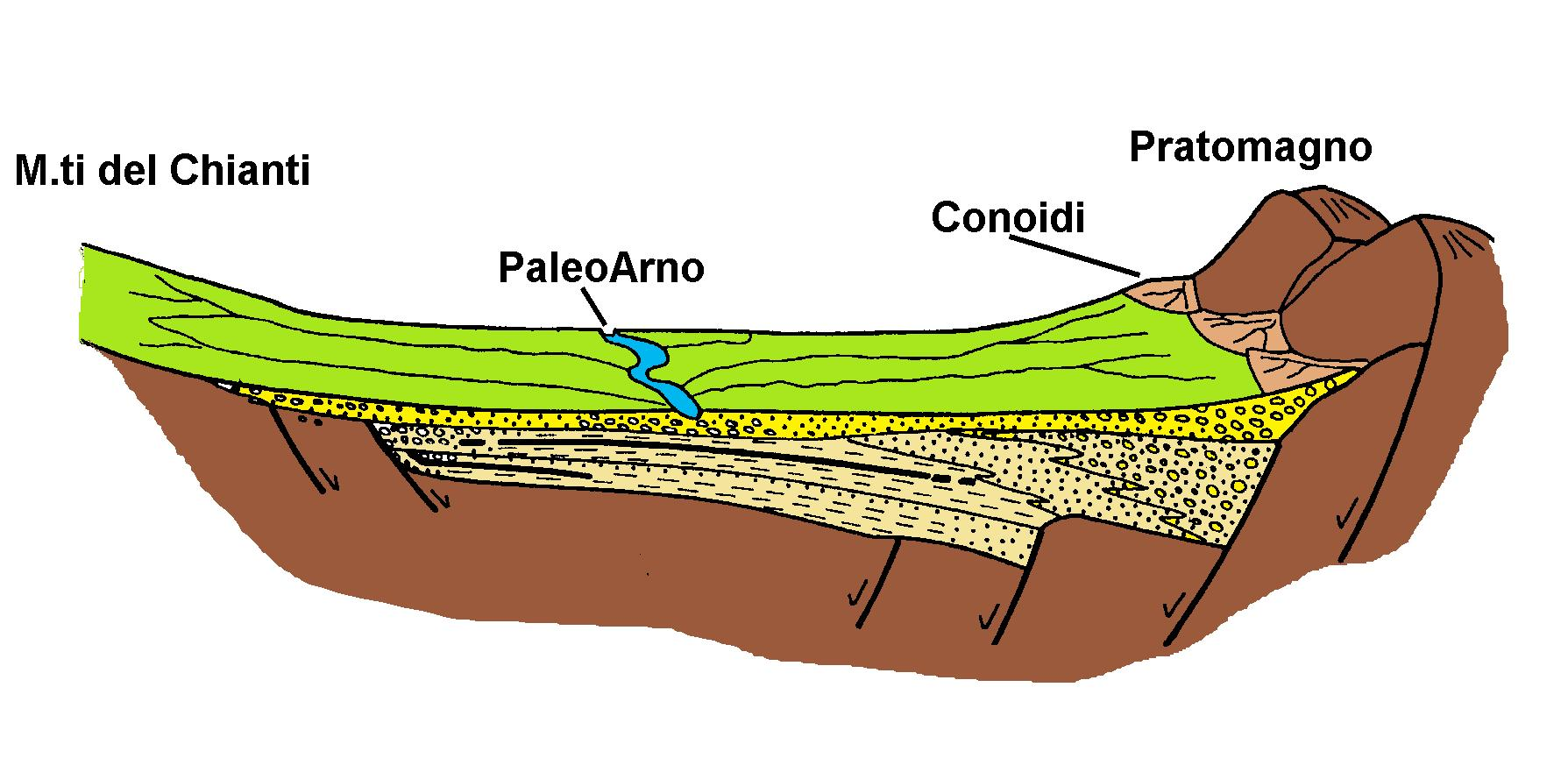 Terza fase fluviale con completo interramento del bacino e arretramento delle faglie verso la dorsale del Pretomagno.